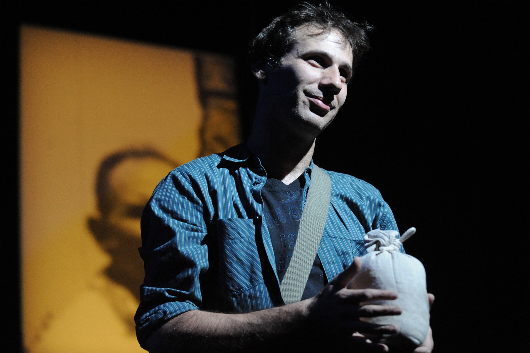 רפליקה אחרונה